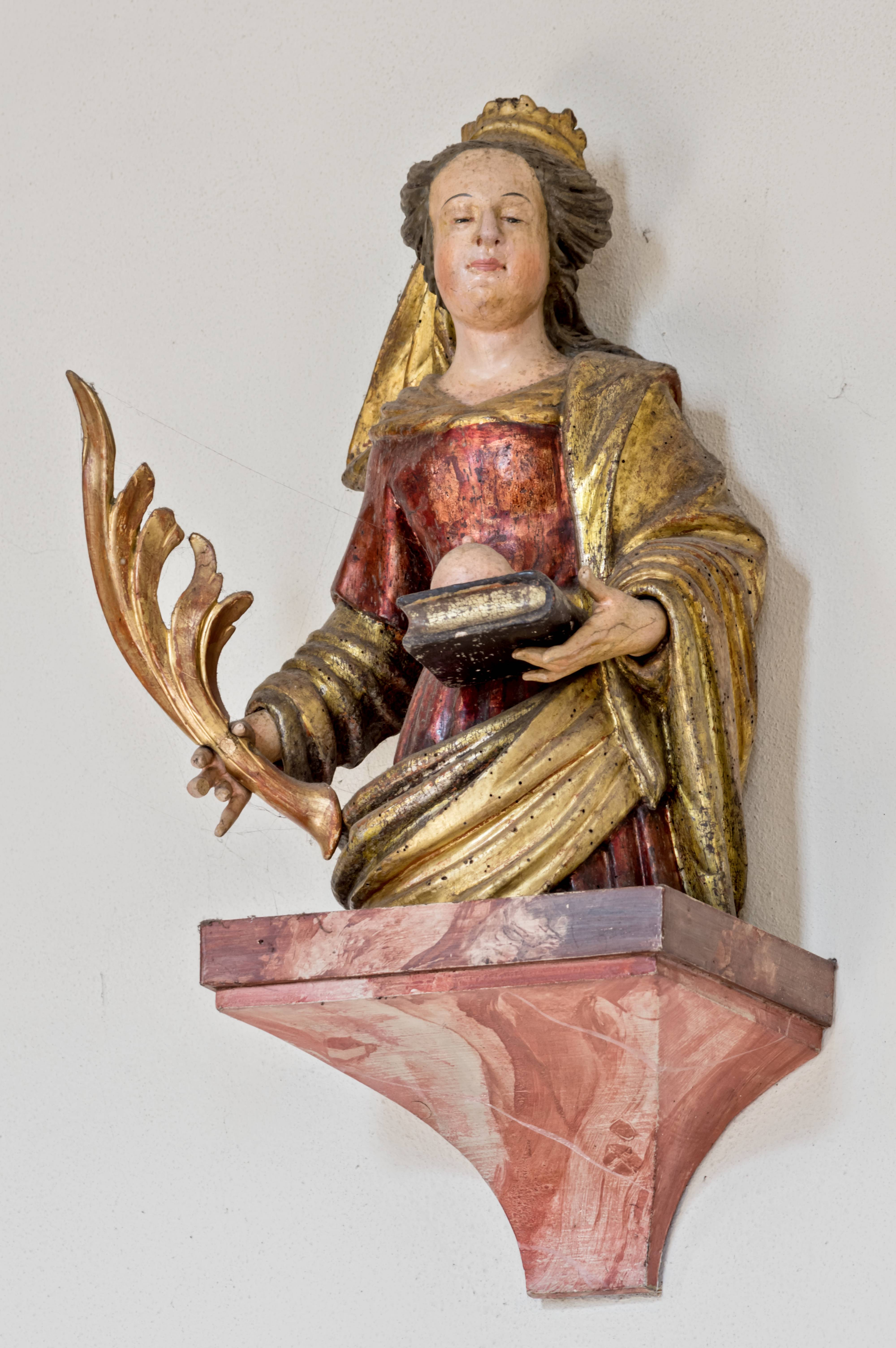 Bilder aus Freiburg von der Kirche St.Peter und Paul in Freiburg Kappel Figur der hl. Agatha über dem alten Zugang zur Sakristei, Andreas Hosing